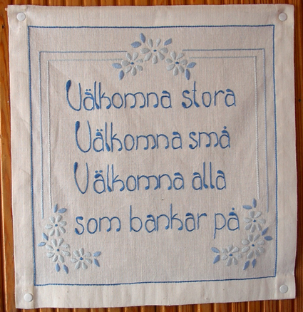 Broderad väggbonad. Efter köpt mönster.